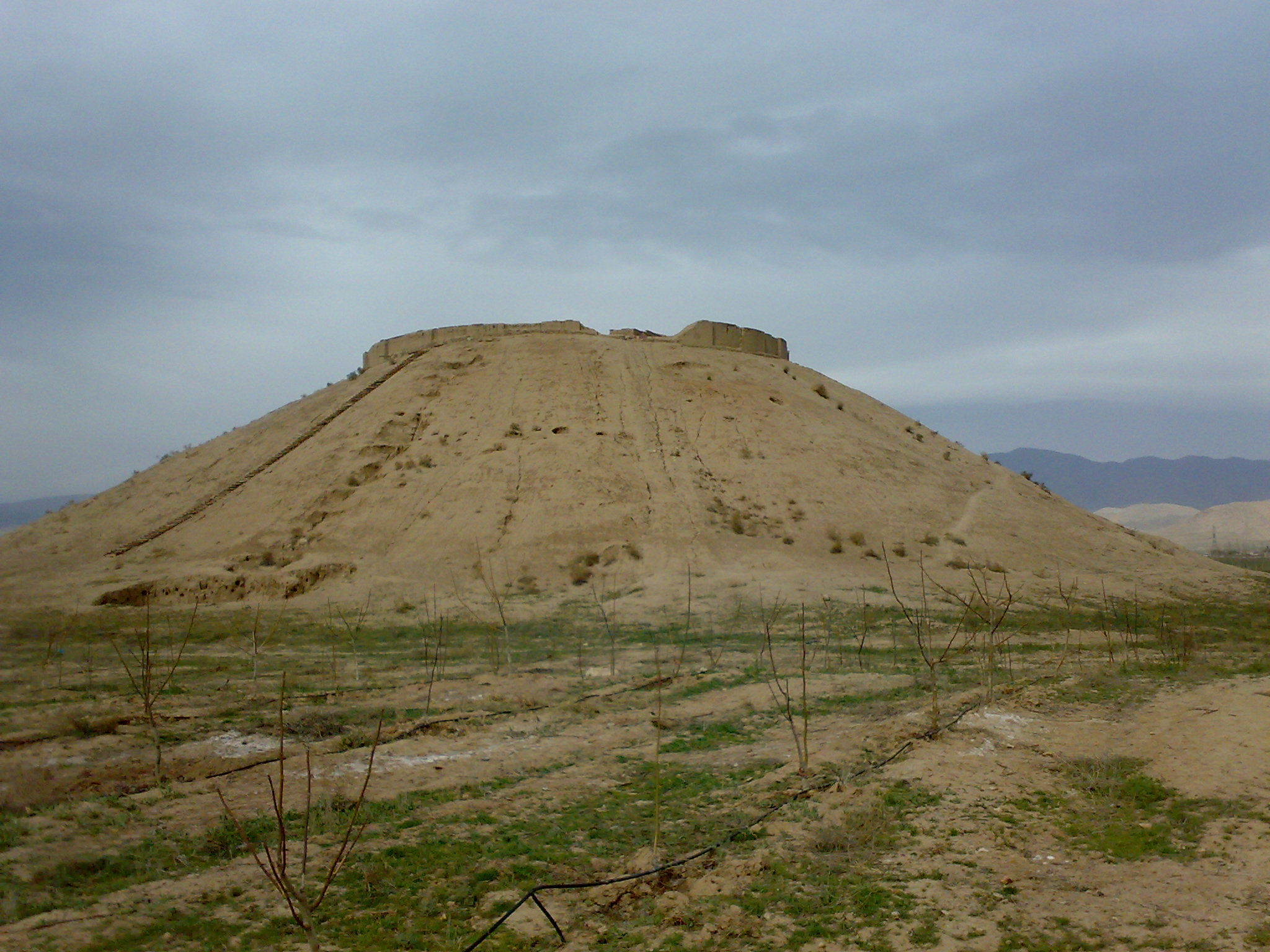 تپه زاغه